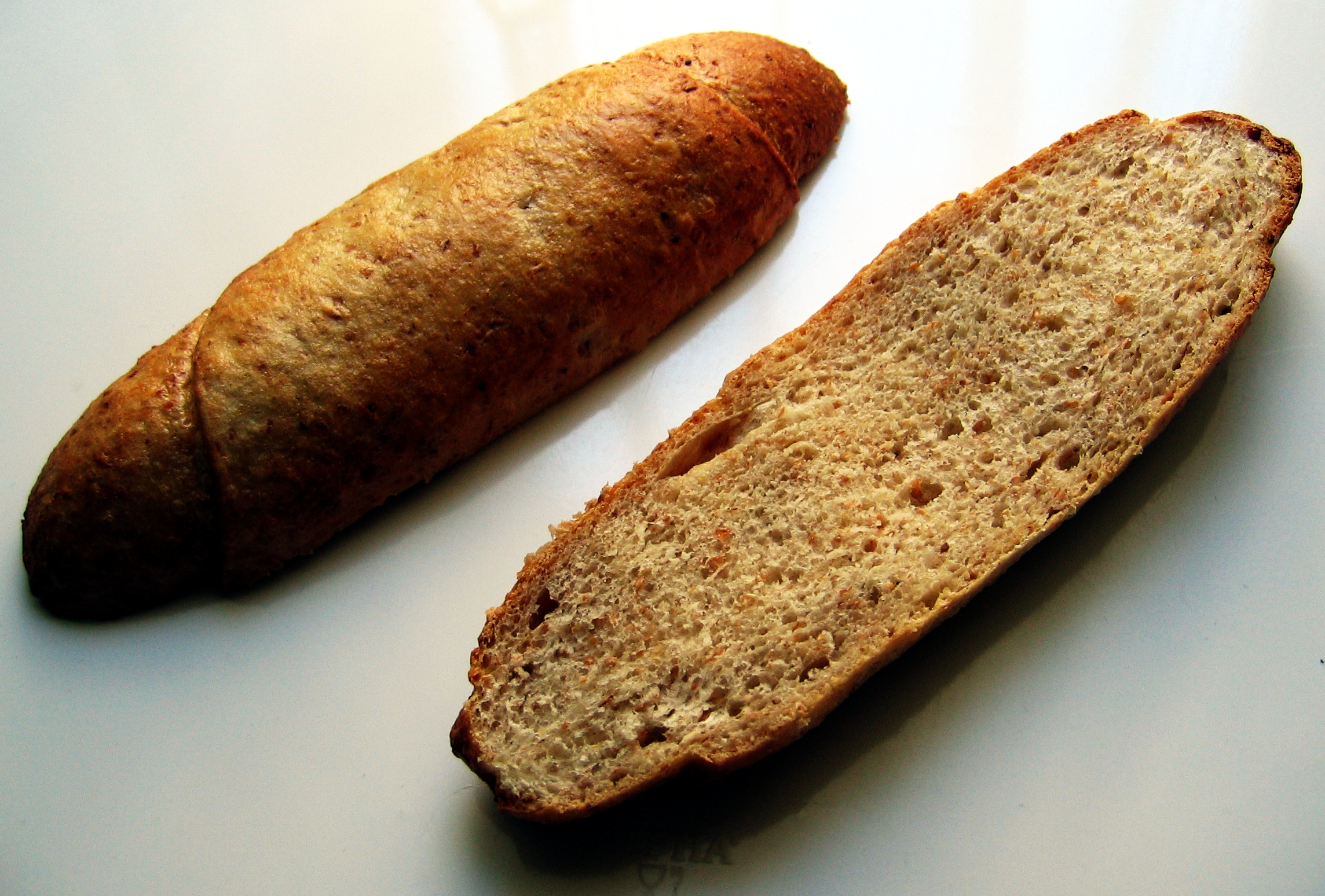 Foto eines in Österreich handelsüblichen länglichen Brötchens aus Grahammehl, genannt Grahamweckerl.